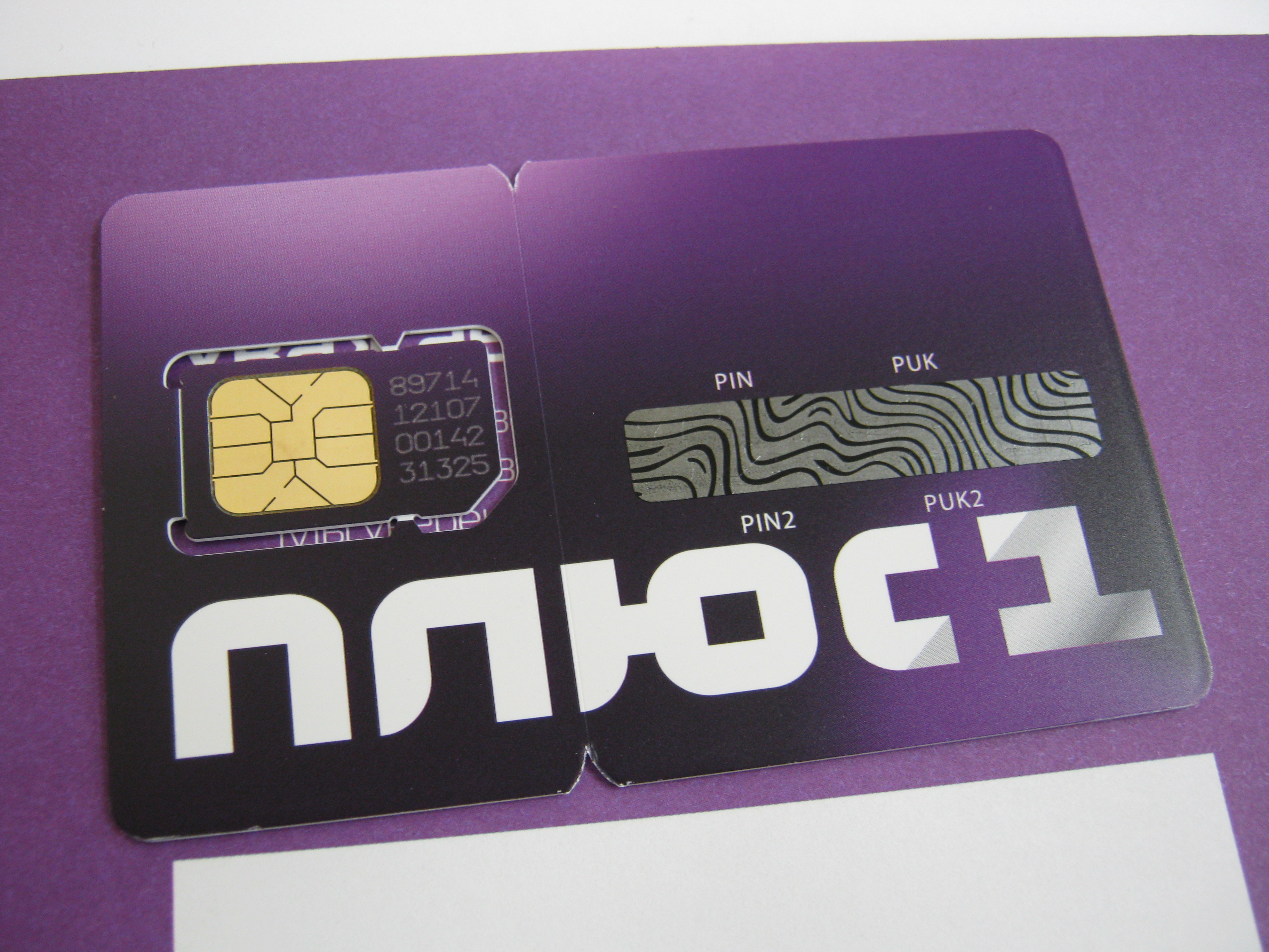 комплект +1